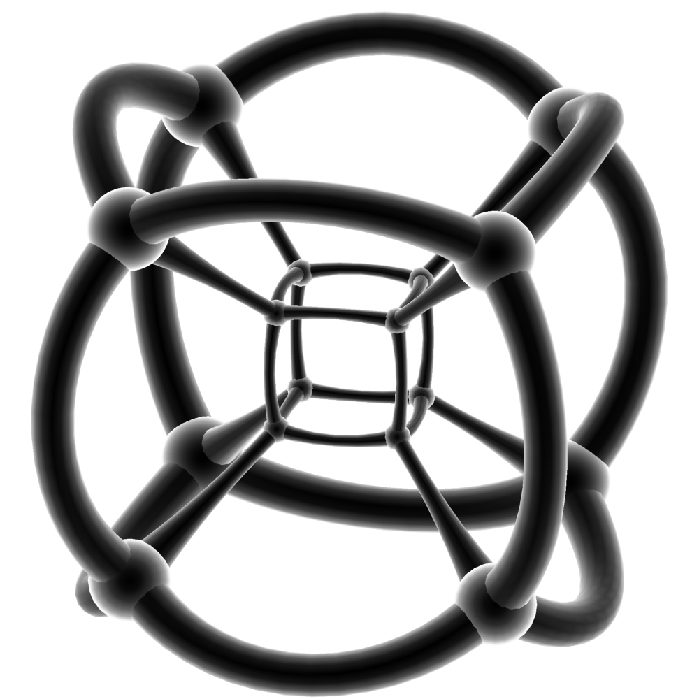 Projection stéréographique d'un 8-cellules, un polytope 4-dimensionnel. Les sommets et les arêtes sont montrées, les faces ne le sont pas.